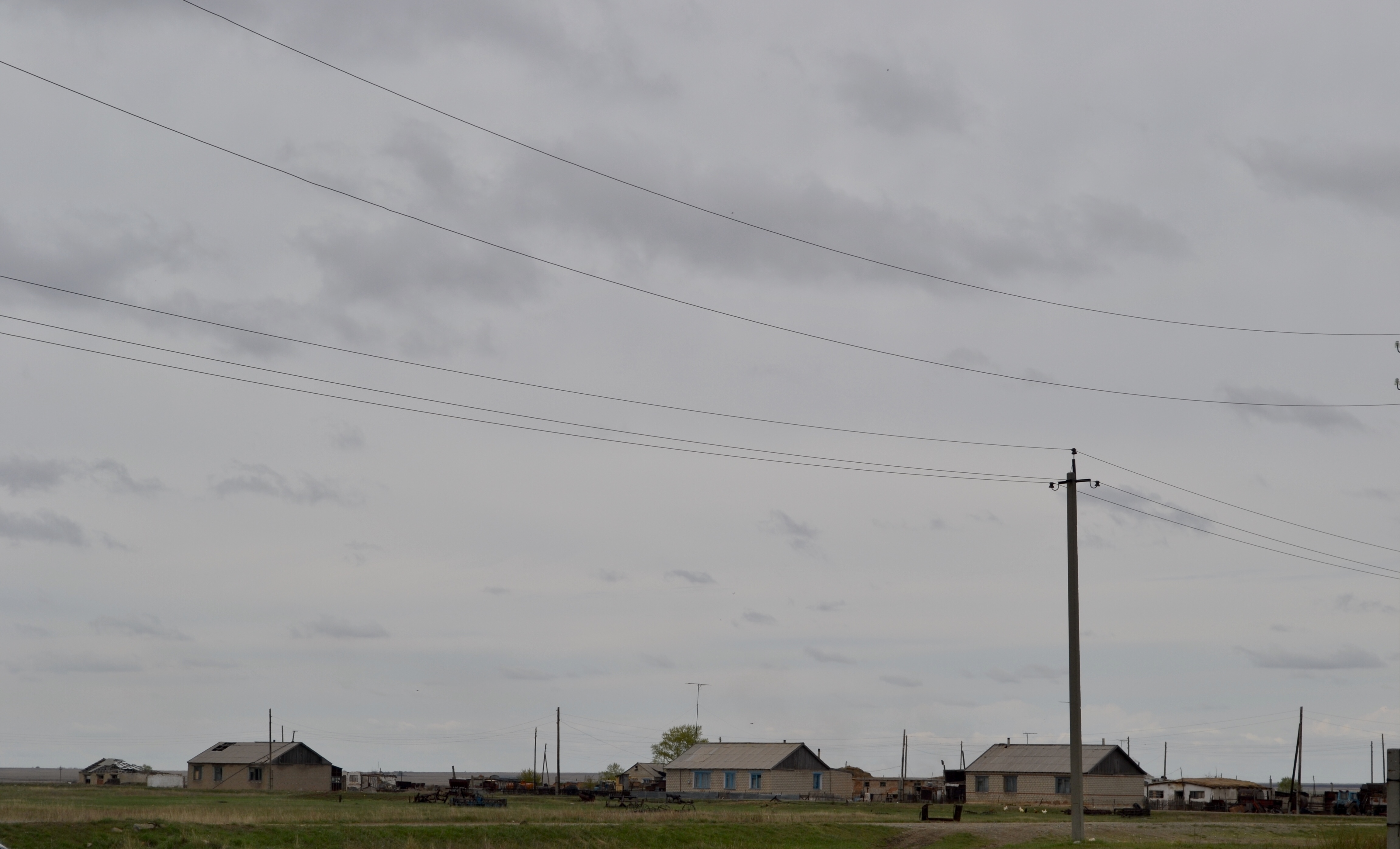 село Кондыбай, Житикаринский район